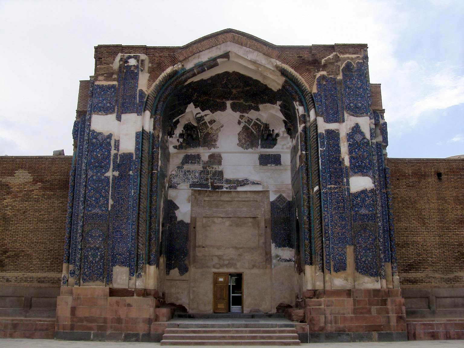 Blue Mosque, Tabriz, Iran